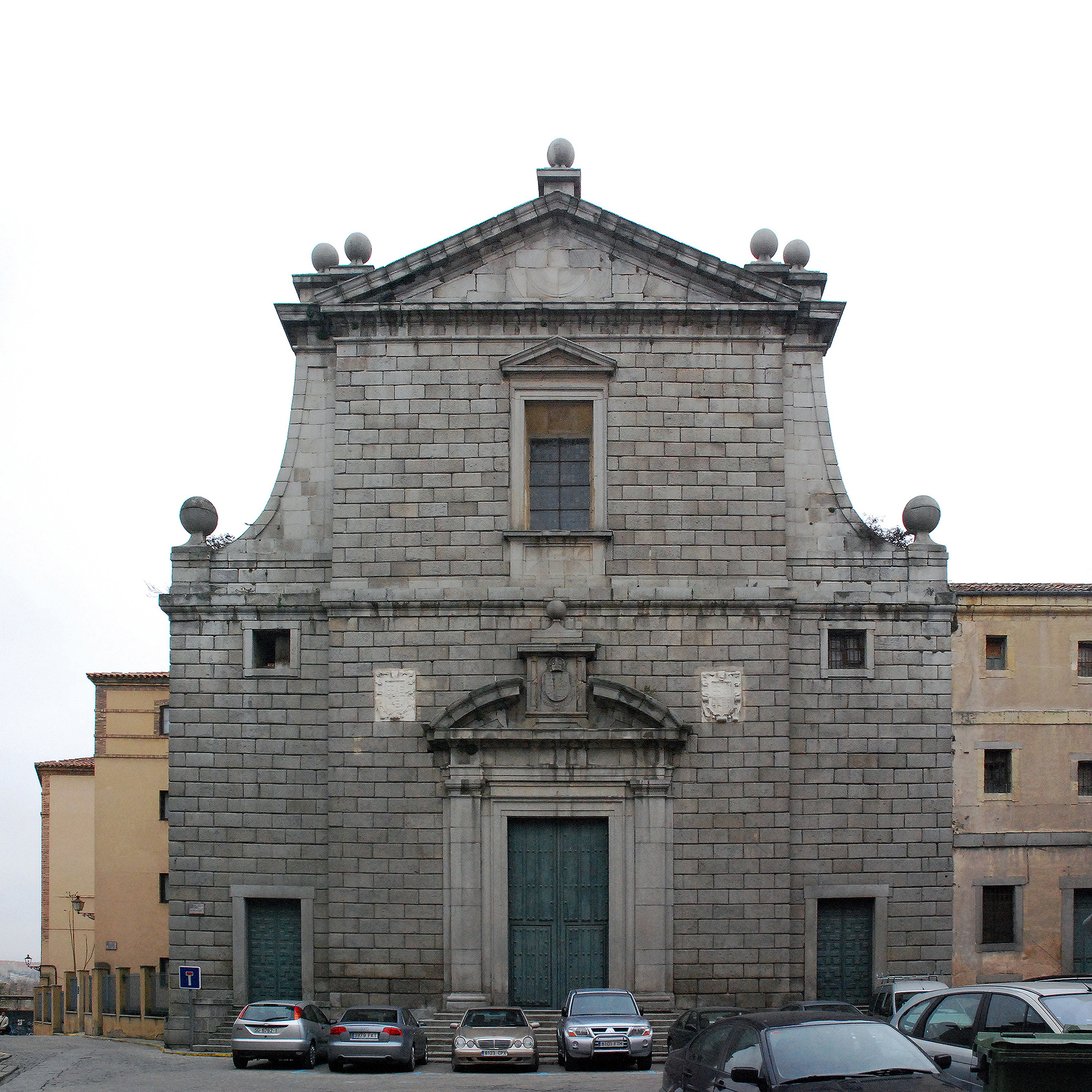 Fachada de la iglesia de la Compañía de Jesús en Segovia